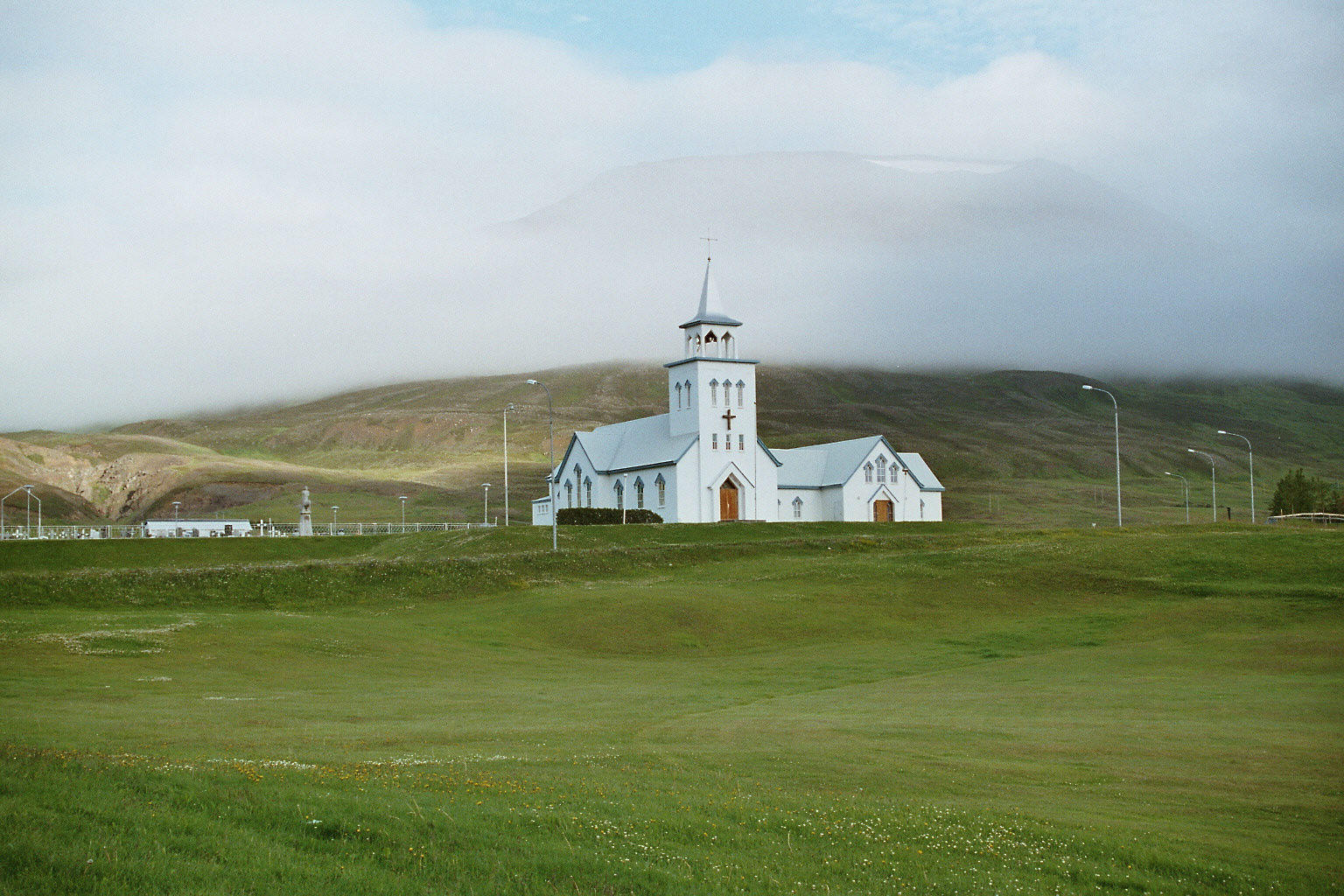 L'église de Dalvík, en 2005